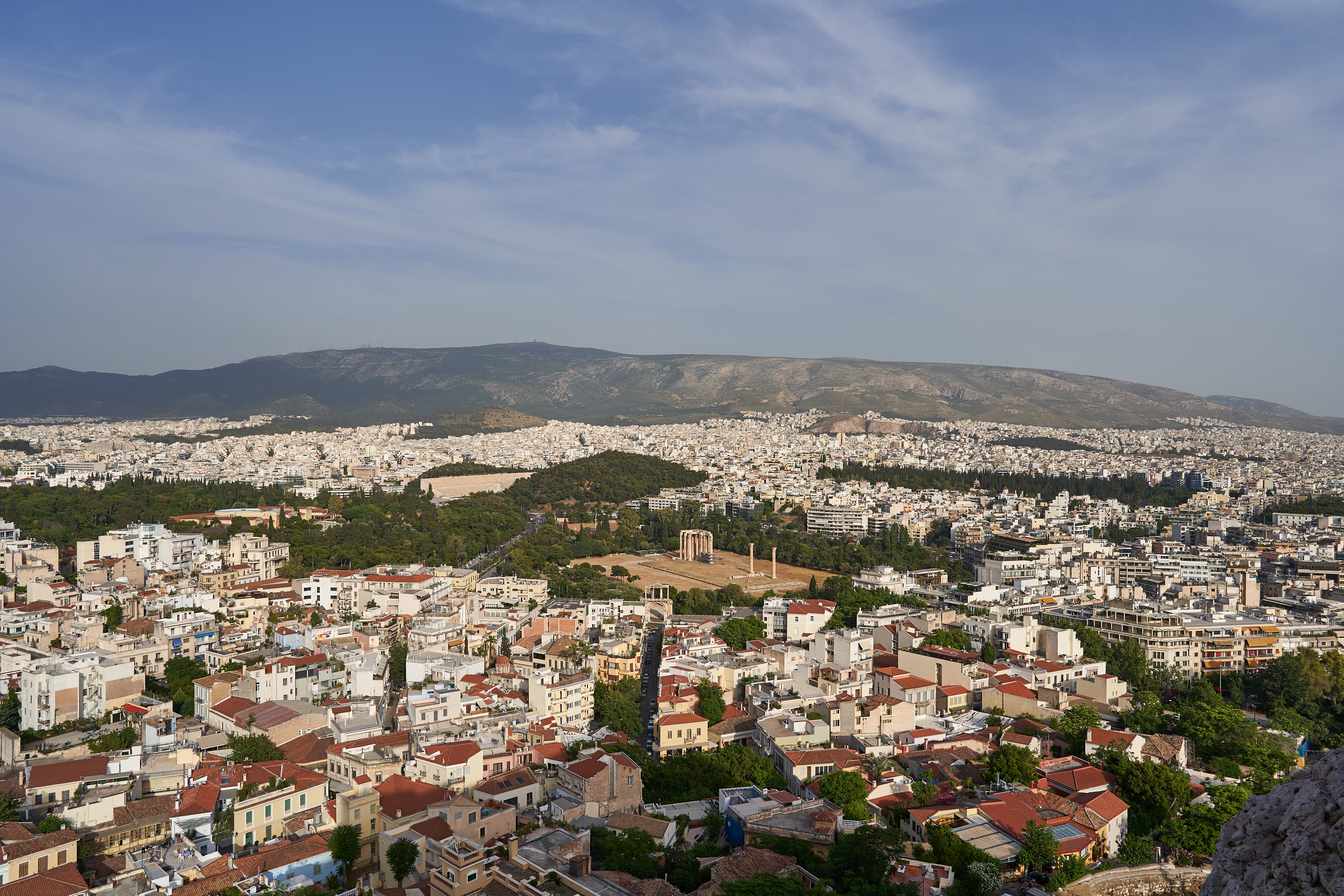 'Αποψη του Όρους Υμηττός από την Ακρόπολη. Στο μέσον, η πόλις των Αθηνών. Ορατά είναι τα ερείπια του Ολυμπιείου, η Πύλη του Αδριανού καθώς επίσης και ο Λόφος του Αρδηττού με το Παναθηναϊκό Στάδιο. This is a photography of Natura 2000 protected area with ID GR3000006